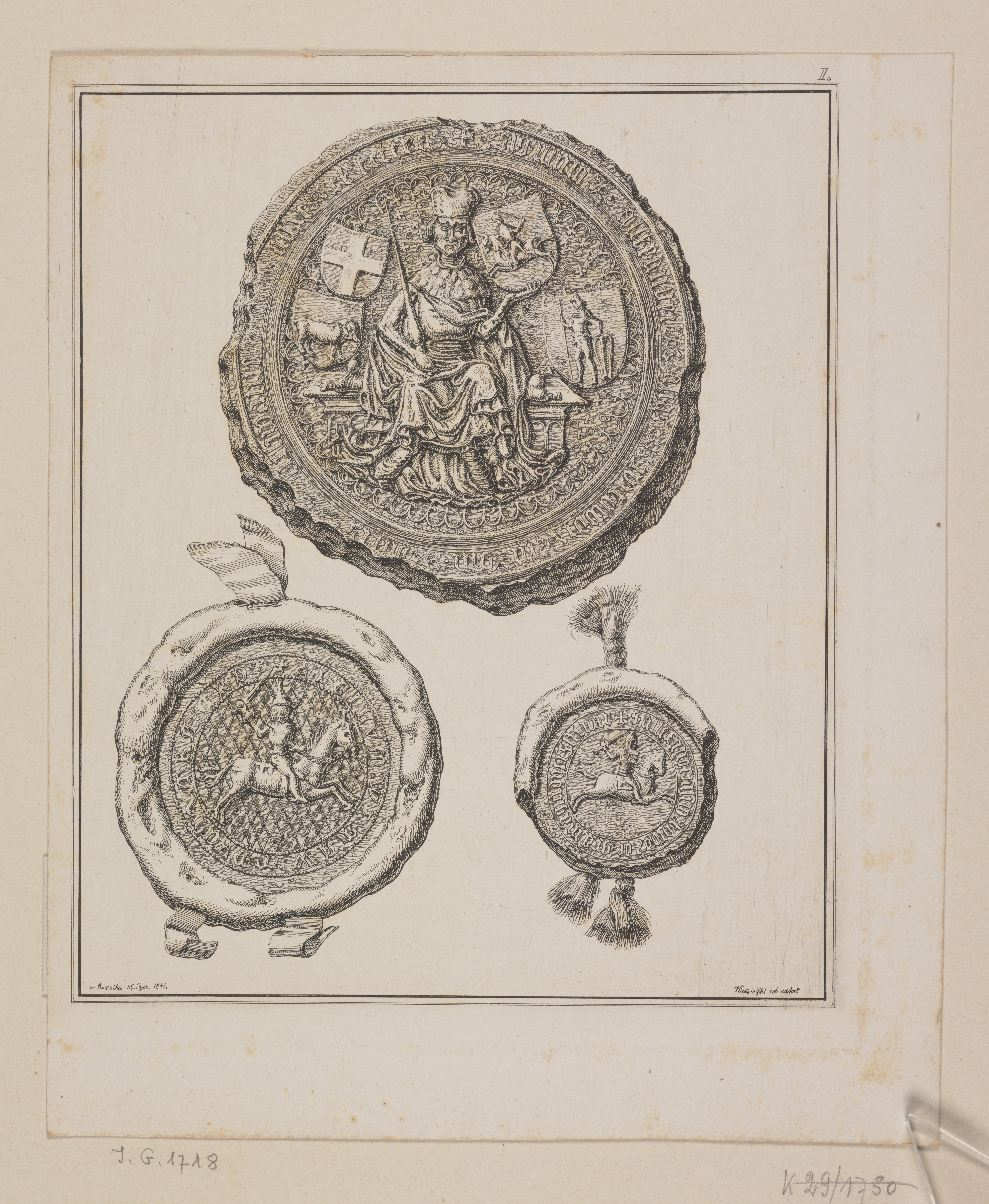 Беларуская (тарашкевіца): Пячаткі Вітаўта Вялікага (Vitaŭt Vialiki)